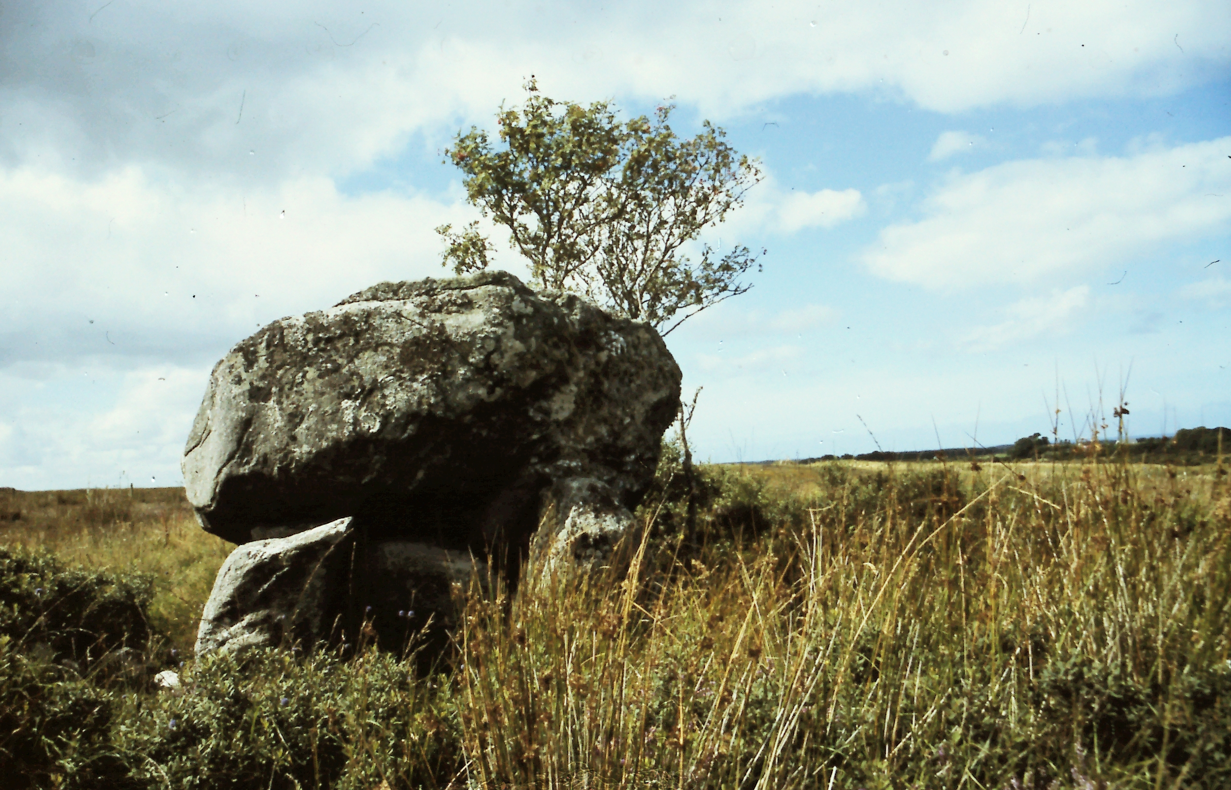 Dolmen Crowagh or Duneill Mountain